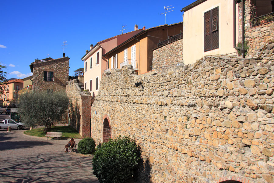 Veduta di Villanova d'Albenga con le mure che circondano il centro storico